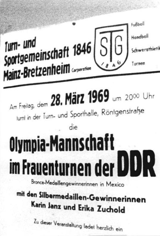 Veranstaltungsplakat Zentralbild DFF 31.3.1969-Westdeutschland: Skandal in Mainz - Auf Einladung der westdeutschen Turn- und Sportgemeinschaft Mainz-Bretzenheim war die DDR-Frauenturnnationalmannschaft zum Schauturnen nach Mainz gekommen. Gegen den Willen des Veranstalters, der Achtung und Anerkennung in Emblem und Flagge zugesichert hatte, (unser Foto zeigt das Werbeplakat) riß das politische Kommissariat 14 die DDR-Flagge von der Wand und erzwang den Abbruch. (Siehe ADN-Meld. 639 v. 30.3.69)